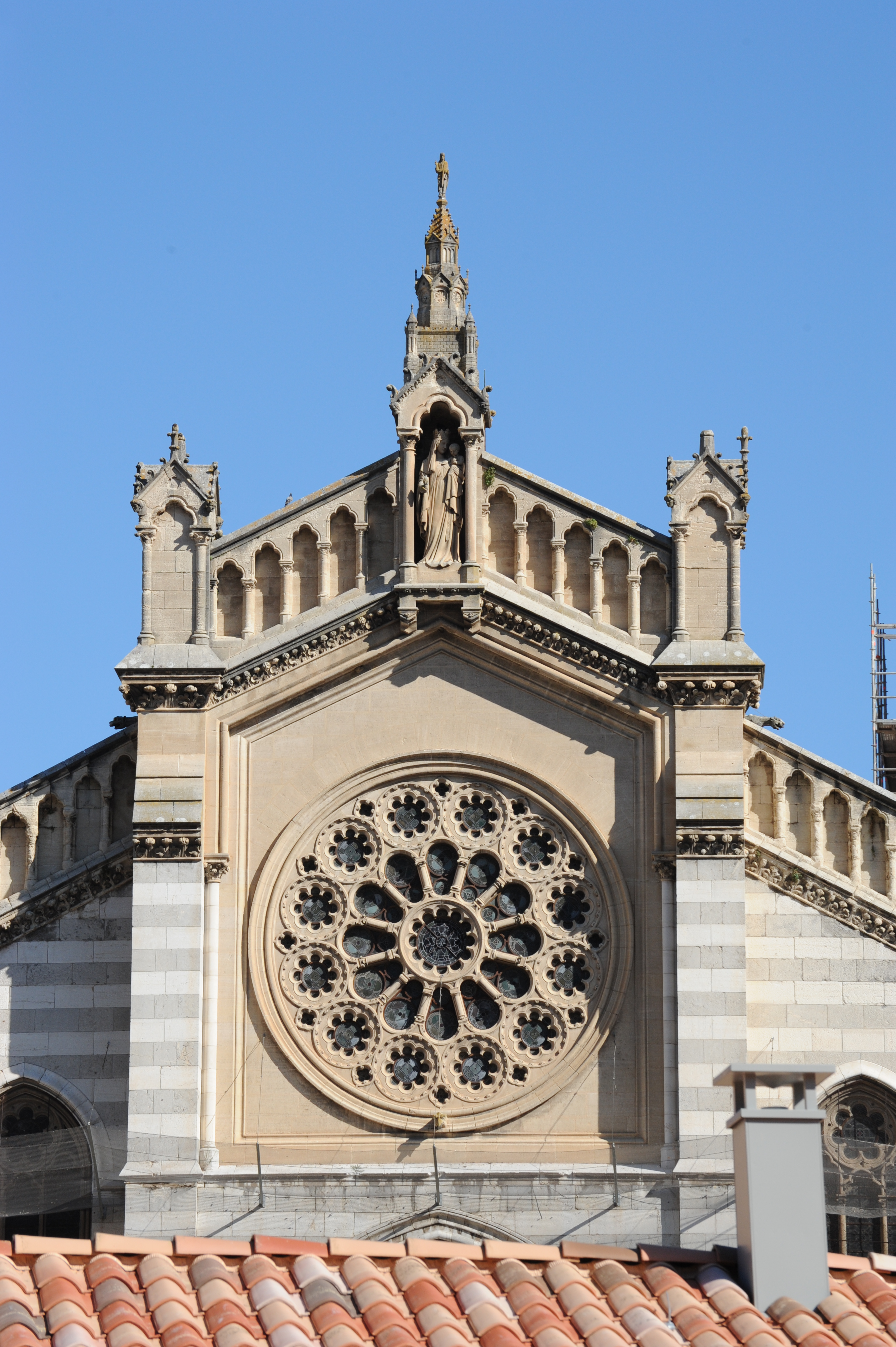 Rosace de la façade de la Cathédrale Saint-Jérôme à Digne-les-Bains - Alpes de Haute-Provence .